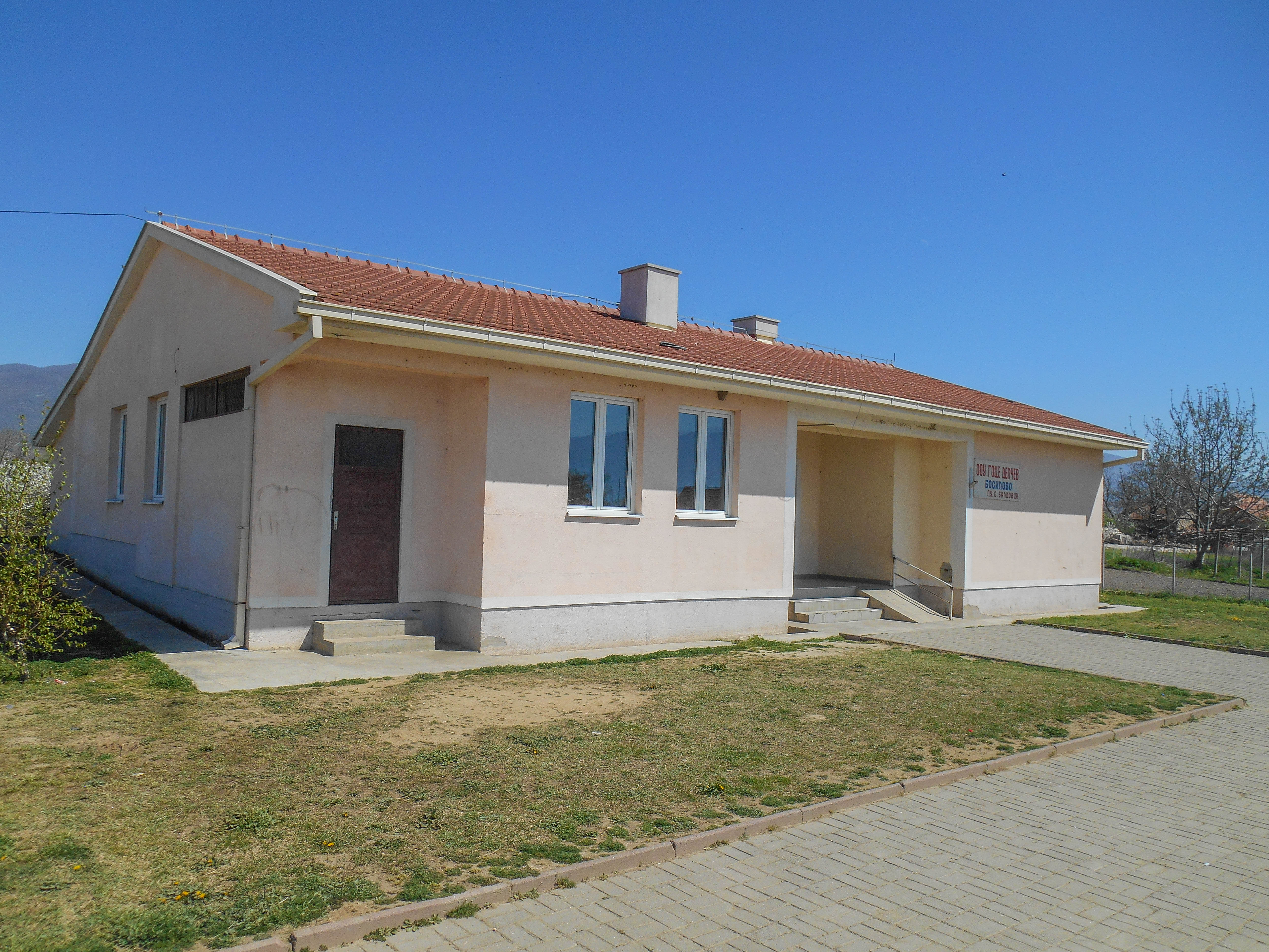 Основно училиште „Гоце Делчев“ - Старо Балдовци